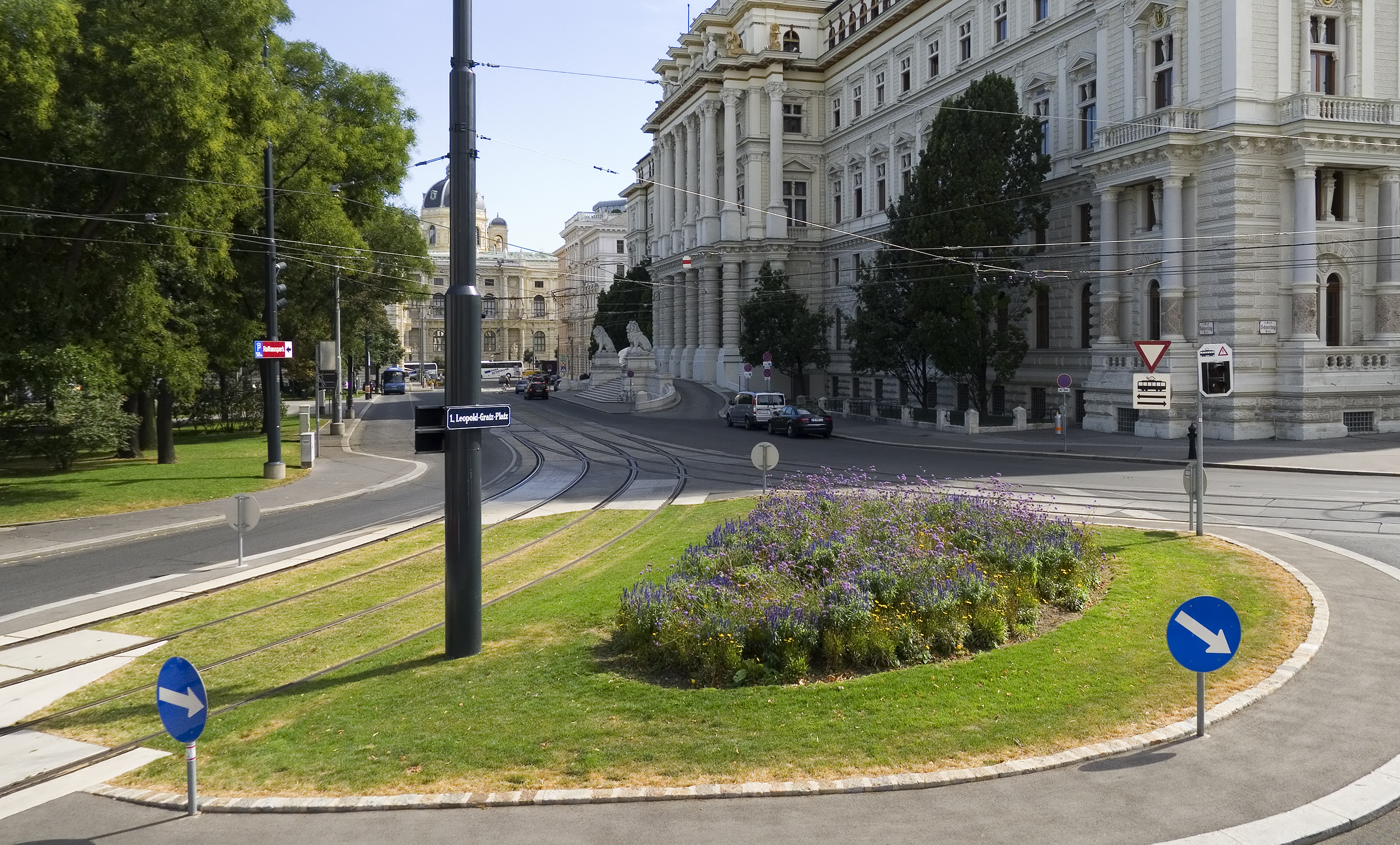 Leopold-Gratz-Platz in Wien 1 Richtung Süden